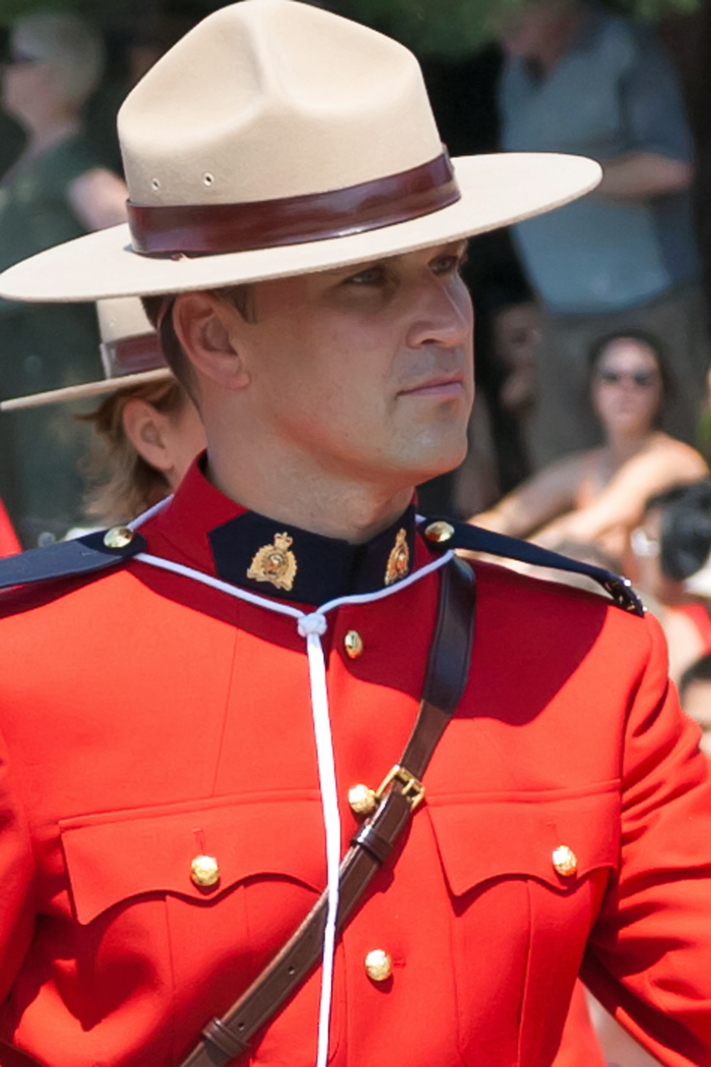 Vancouver Pride 2009